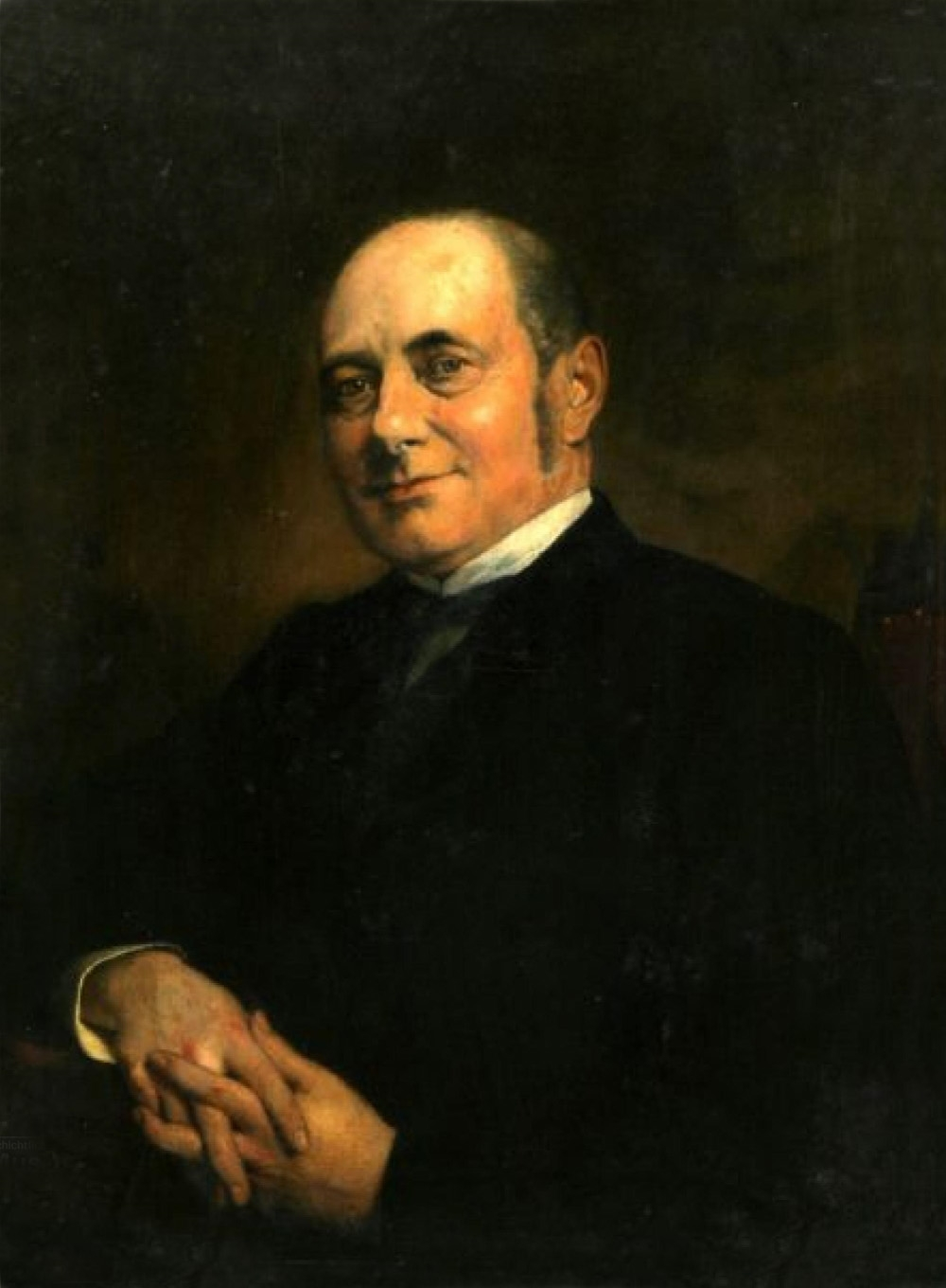 Carl Ferdinand Rhode. Ölgemälde von Paul Kießling